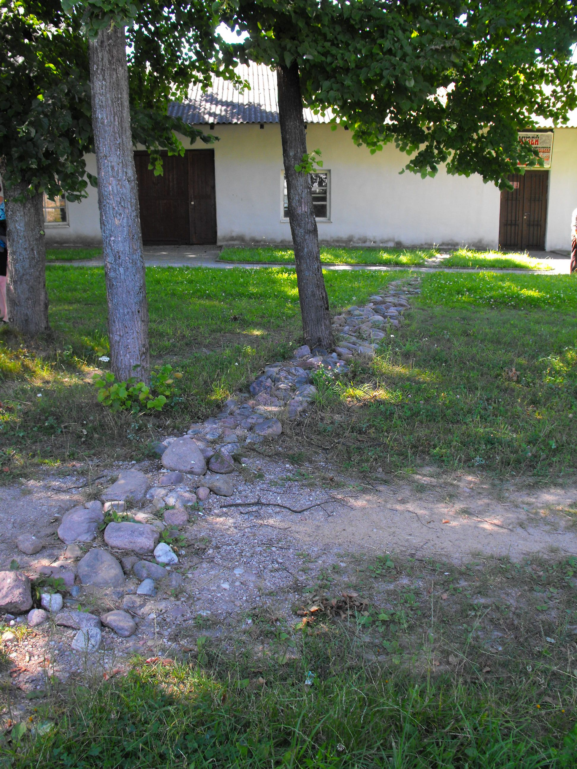 Музей еврейского сопротивления в Новогрудке в здании барака бывшего гетто. Обозначенная снаружи часть подземного хода (250 метров), прорытого узниками гетто в 1943 году.